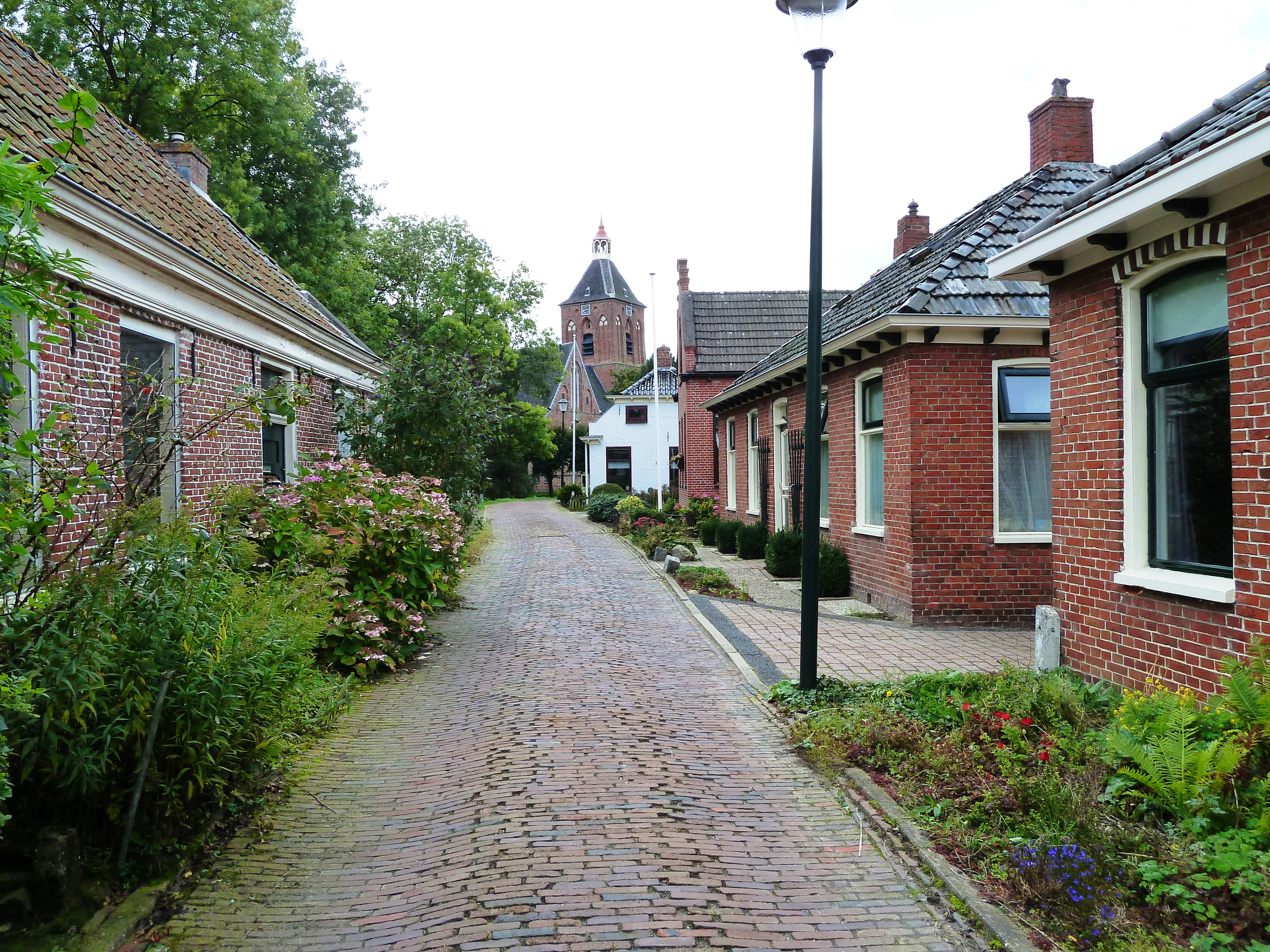 Gezicht over het Kerkpad in de richting van de kerktoren van Middelstum (Groningen, Nederland)